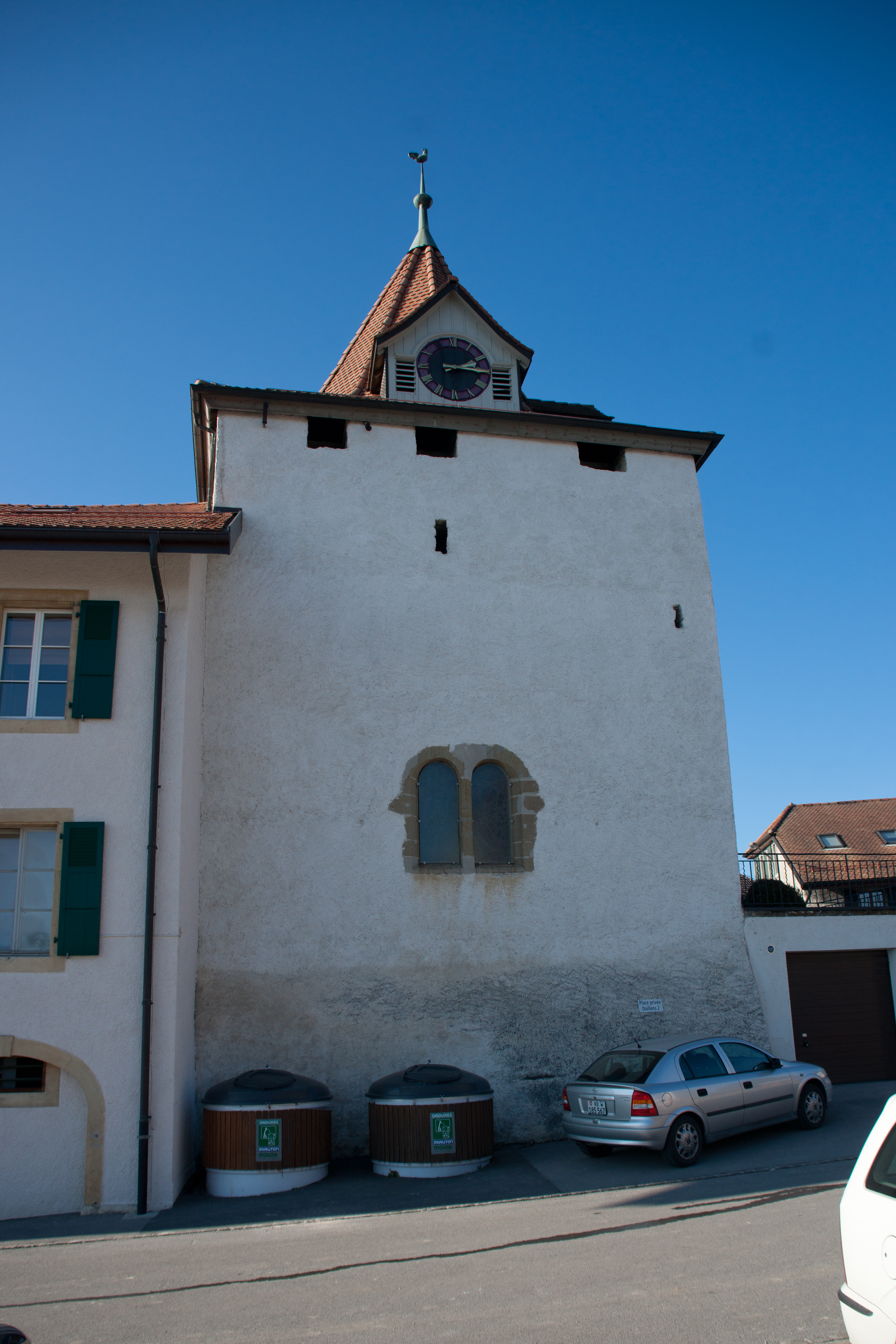 Temple de Penthalaz, canton de Vaud, Suisse.